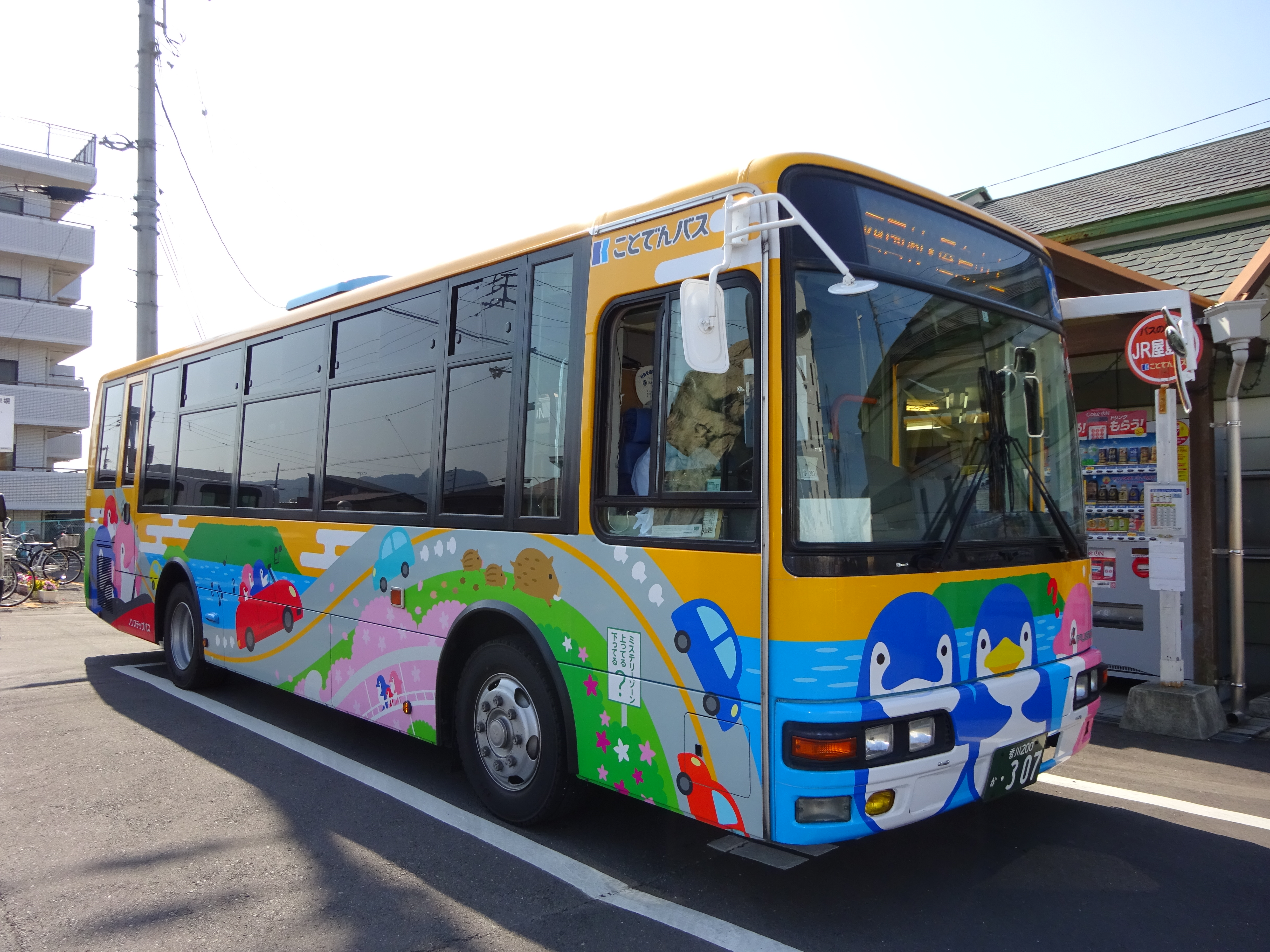 「ことちゃん」ラッピングの屋島山上シャトルバス（ことでんバス）